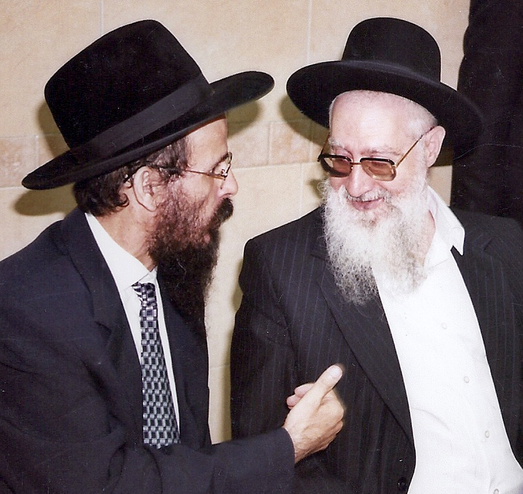 הרב נתן בוקובזה ז"ל עם הרב יעקב יוסף ז"ל. בעת ביקורו של הרב יוסף במוסודת הרב בוקובזה בנתיבות. תחילת חורף ה'תשס"ו